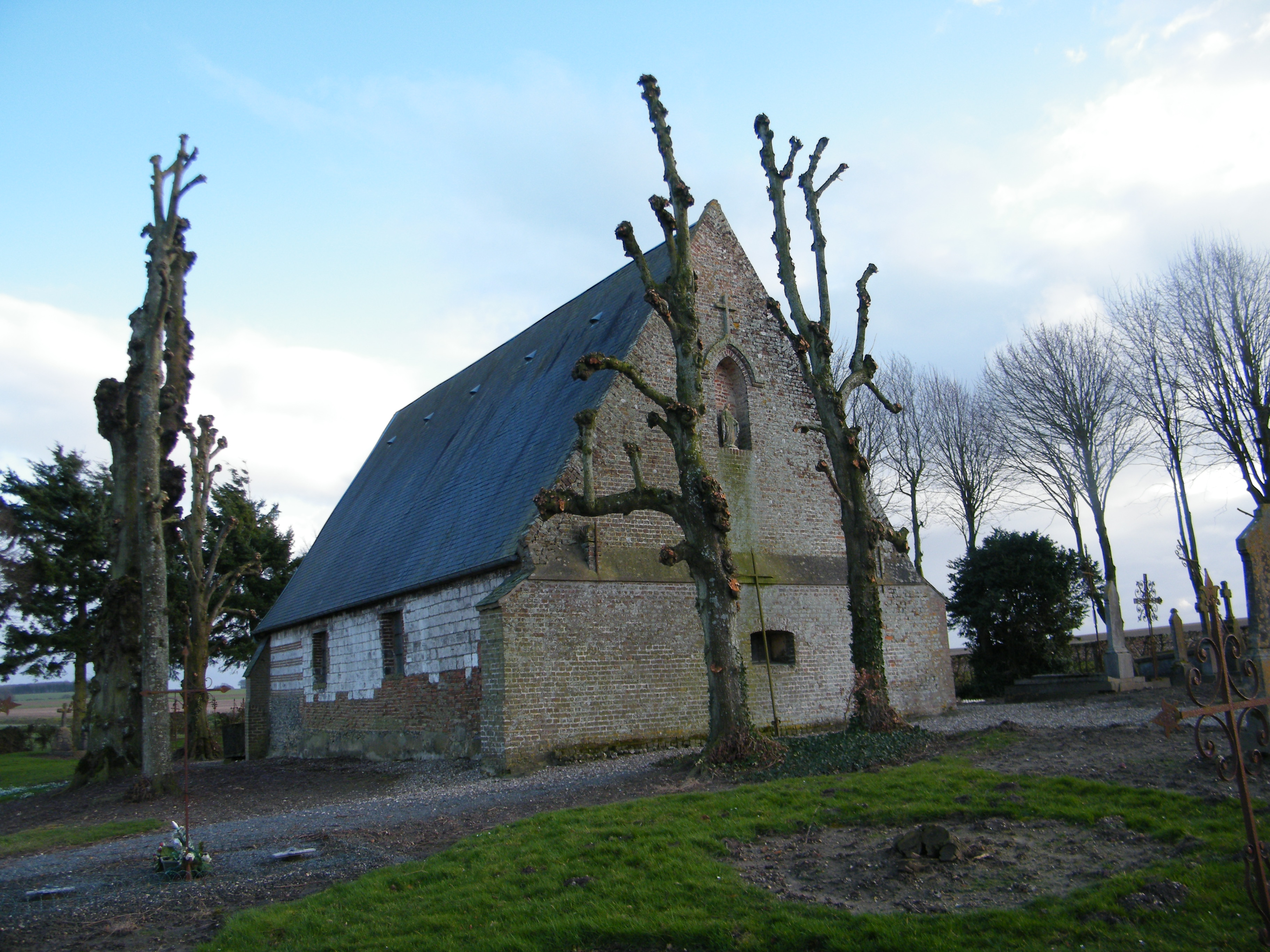 Chapelle des trois cents corps.